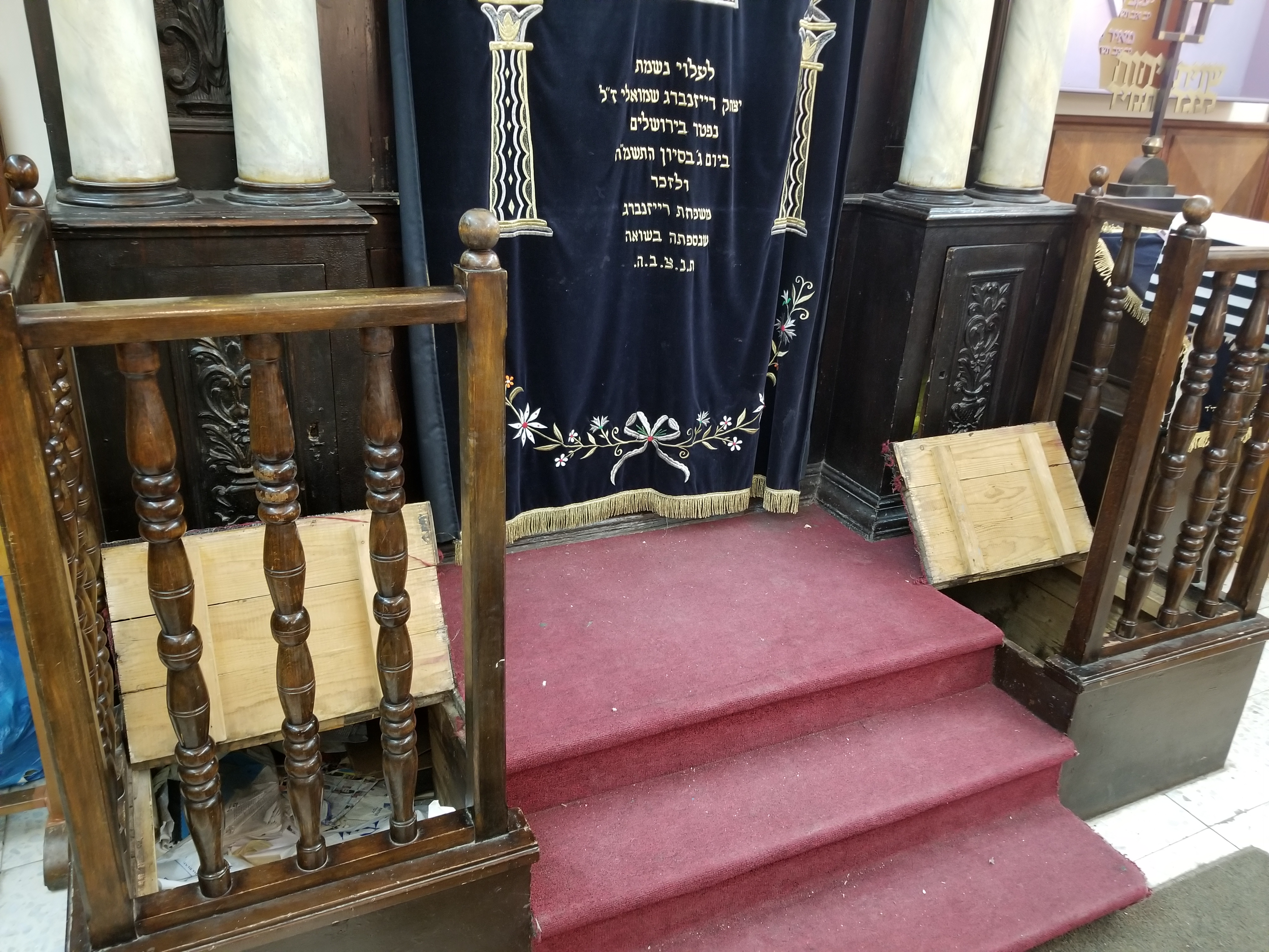 הסליק תחת ארון הקודש בבית הכנסת אחדות ישראל כשהוא פתוח